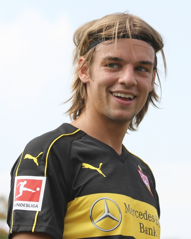 Borna Sosa beim offiziellen Trainingsauftakt. Aufgenommen von